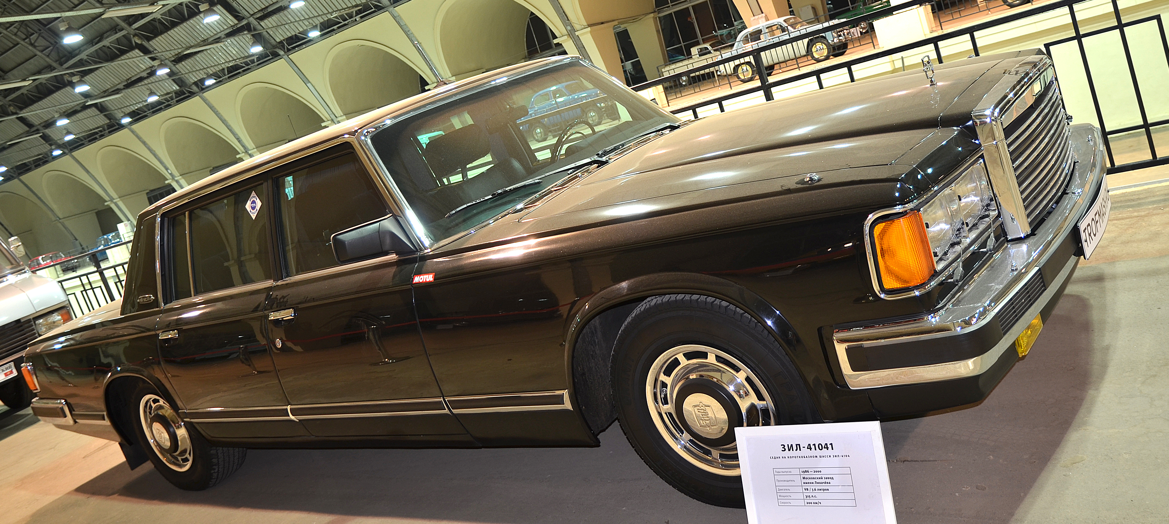 Можно увидеть здесь : You can see here